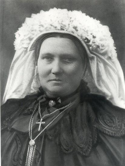 Reek, coiffe brabançonne à la dentelle